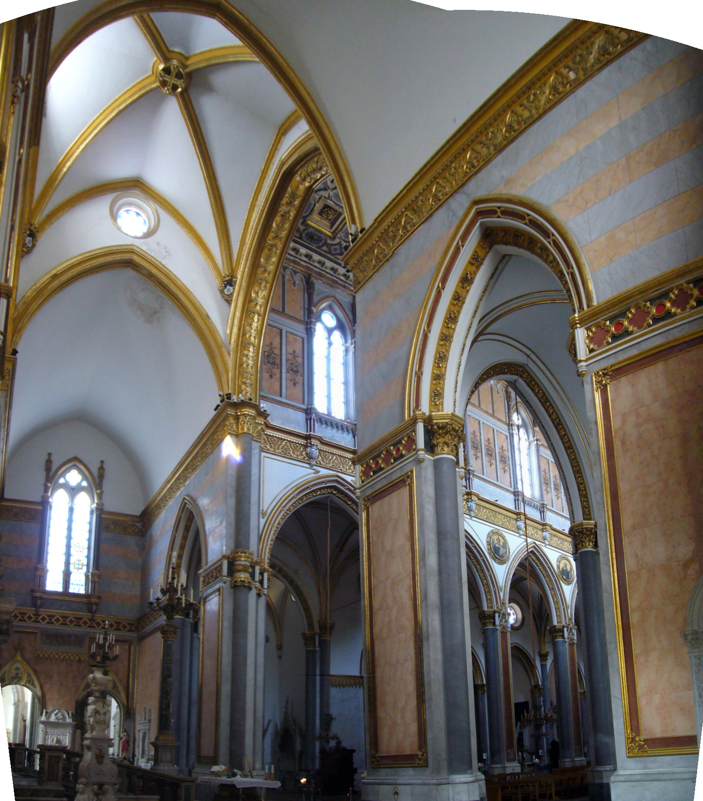 Napoli, san Domenico Maggiore: strutture gotiche del transetto